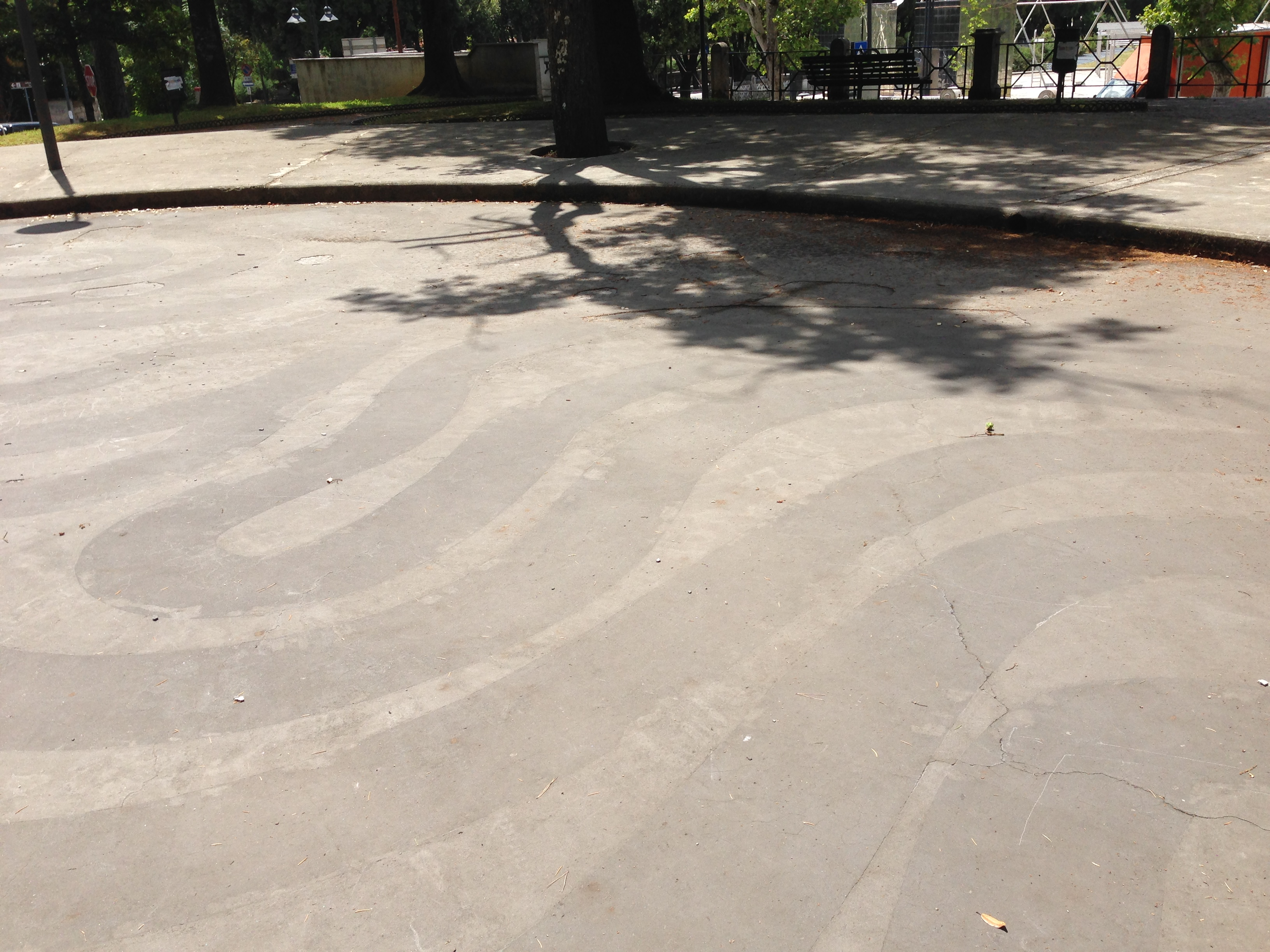 Sol LeWitt, 2003. Spoleto, Pista da ballo davanti alla Casina dell'ippocastano